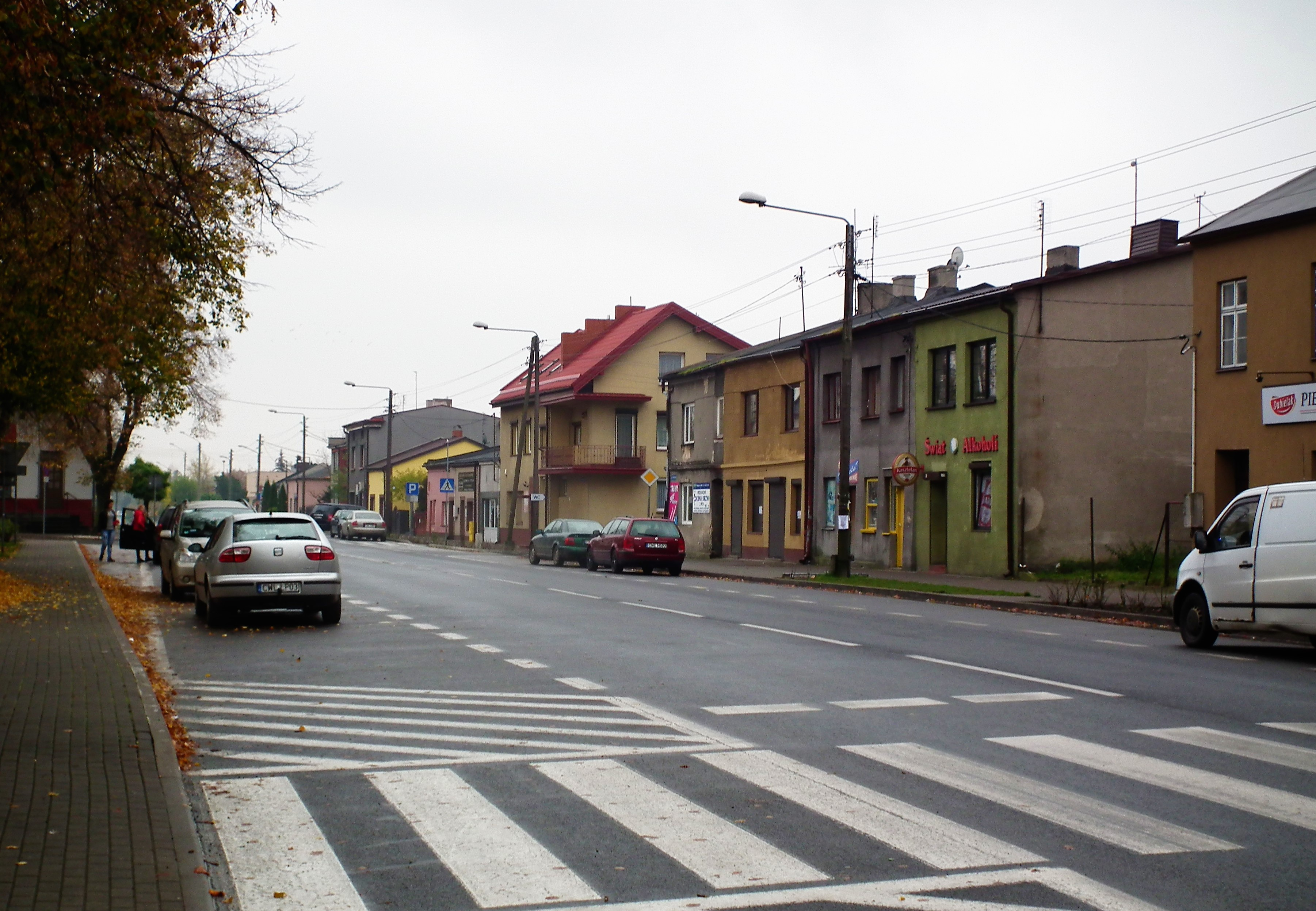 Rynek w Izbicy Kujawskiej.